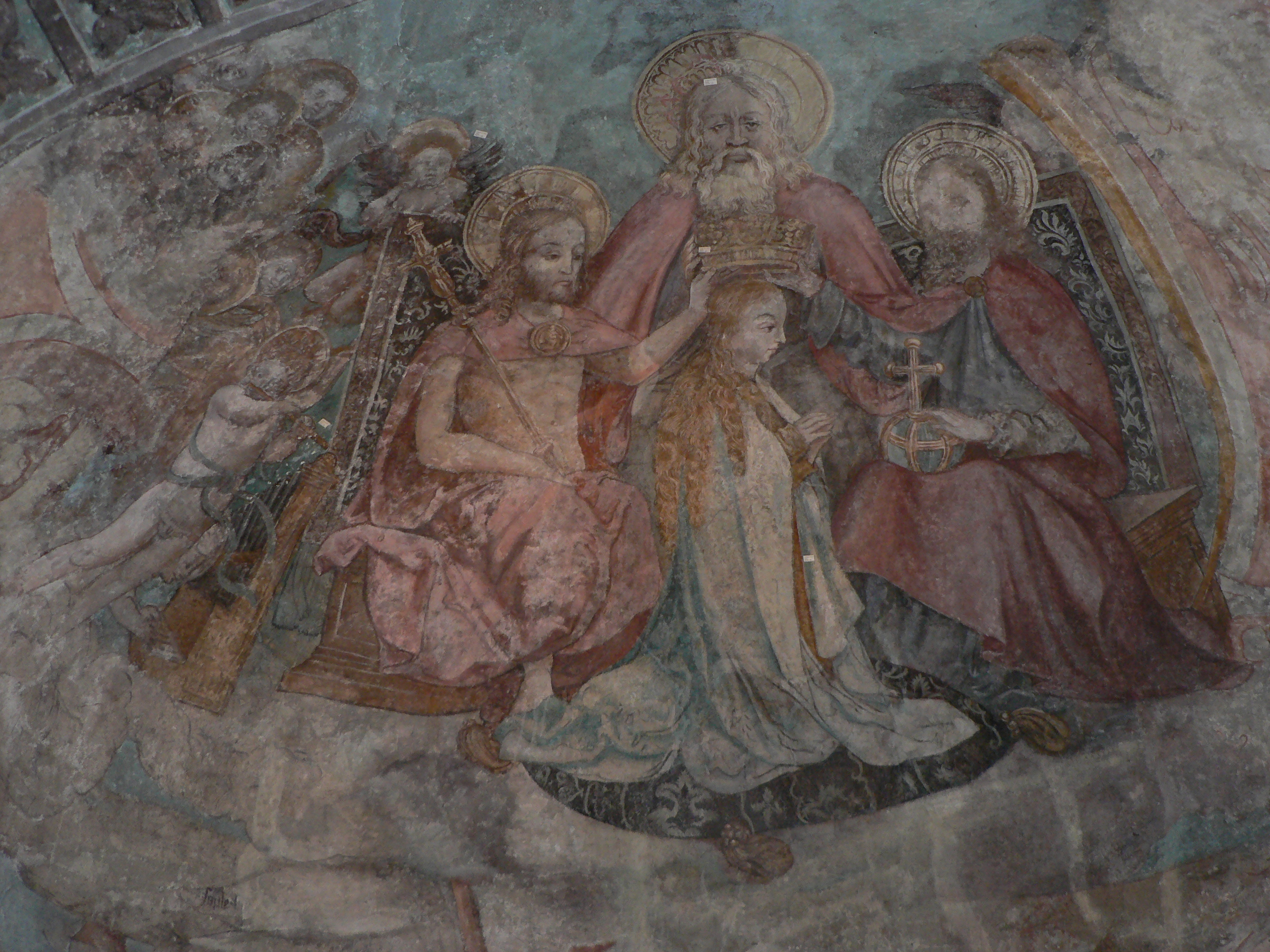 Das Fresko im Chor der Peterskirche in Lindau stellt die Krönung Mariä dar. Das Fresko wird dem Lindauer Maler Mathis Miller zugeschrieben